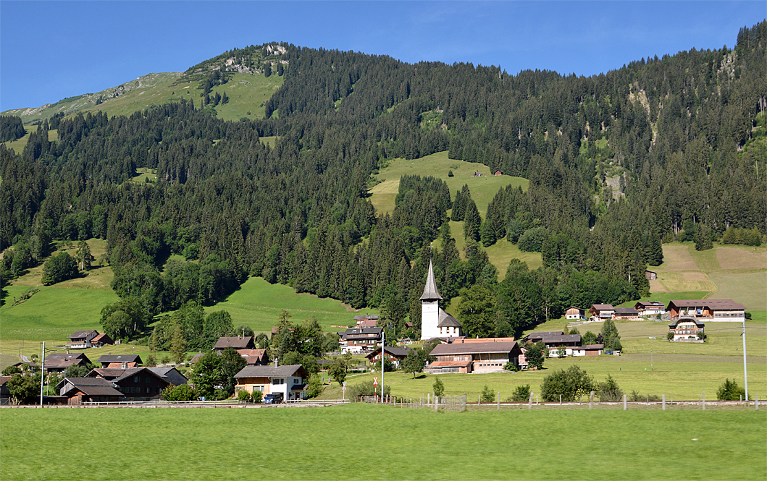 Sankt Stephan im Simmental, Kanton Bern: der Weiler Ried mit der reformierten Kirche